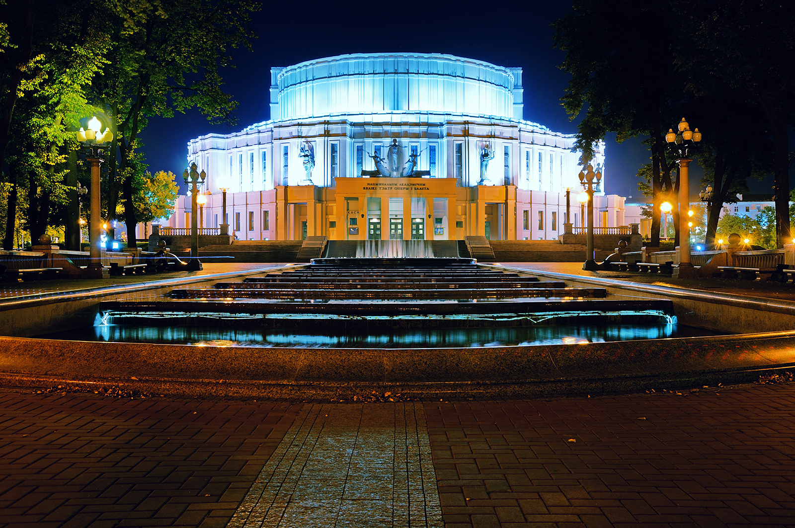 Беларуская (тарашкевіца): Будынак Нацыянальнага акадэмічнага Вялікага тэатра оперы і балета Рэспублікі Беларусь. г. Менск This is a photo of Belarusian heritage monument. Reference number: 711Г000210 ( WLM)